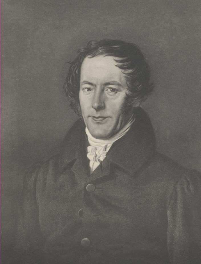 Georg Friedrich Schoemann